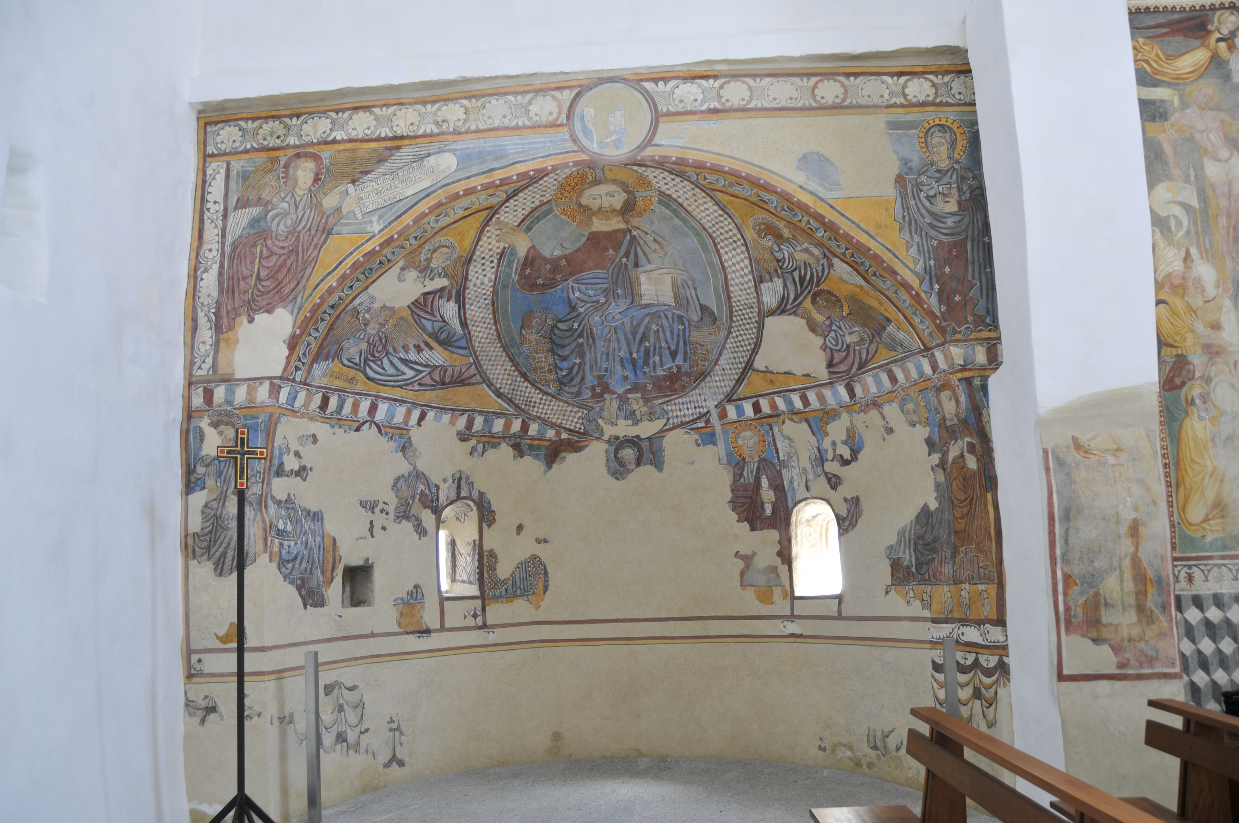 Cademario - Chiesa Sant'Ambrogio vecchio - Antico abside